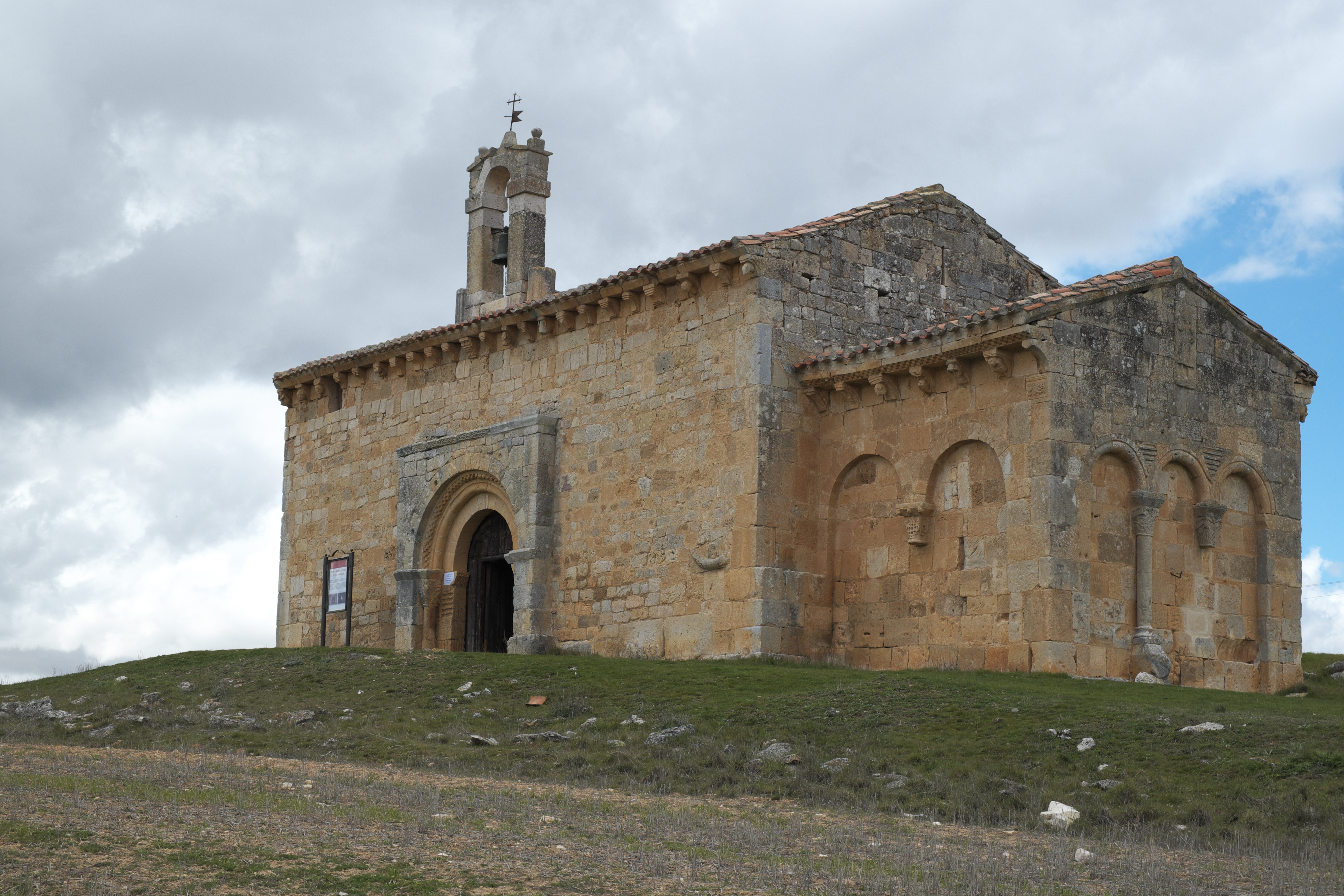 Ermita del Santo Cristo de San Sebastián in Coruña del Conde in der Provinz Burgos (Kastilien-León/Spanien), Ansicht von Südosten